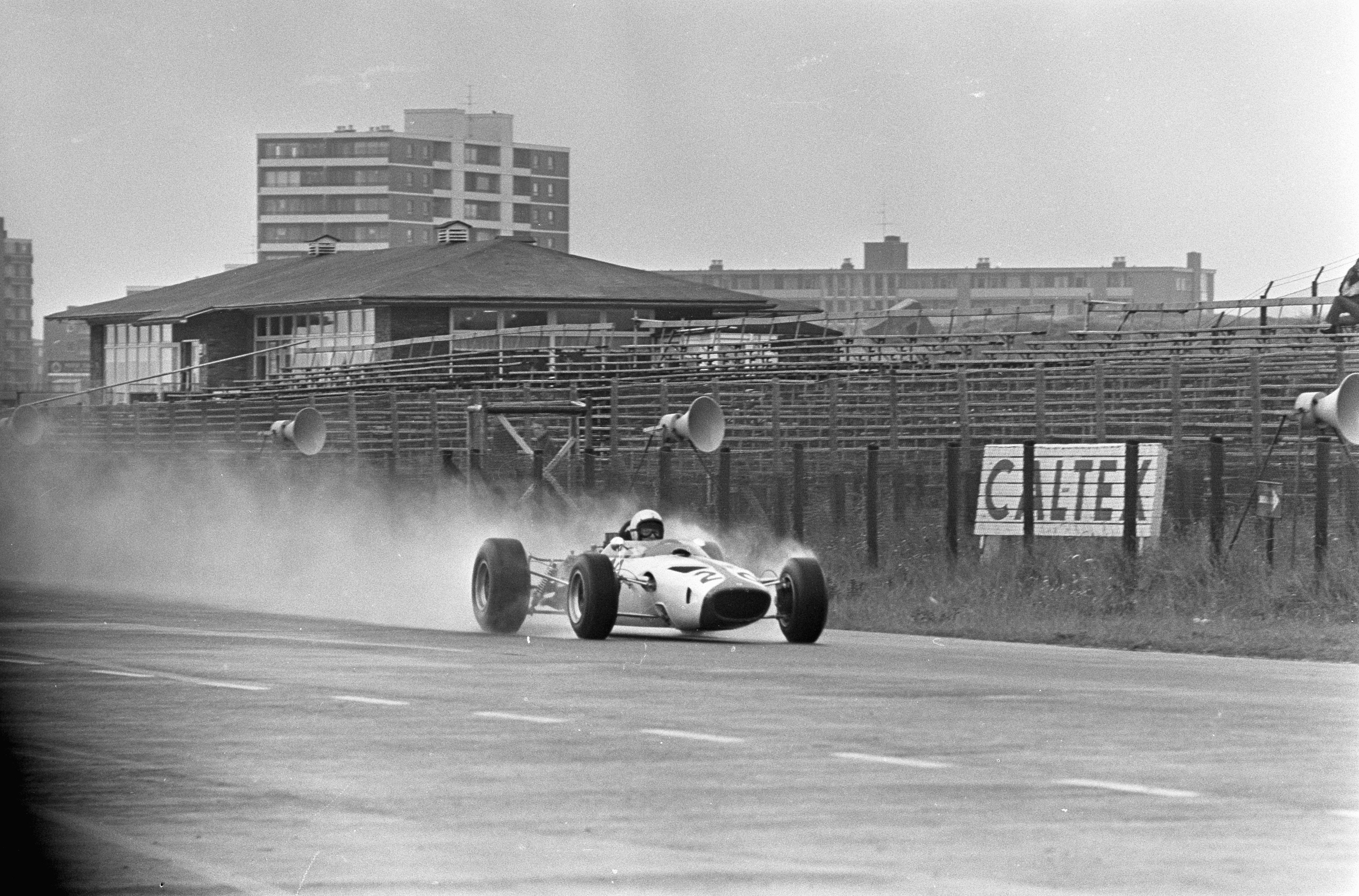 Grand Prix Zandvoort, training, Bruce McLaren in zijn witte McLaren Ford in stromende regen.